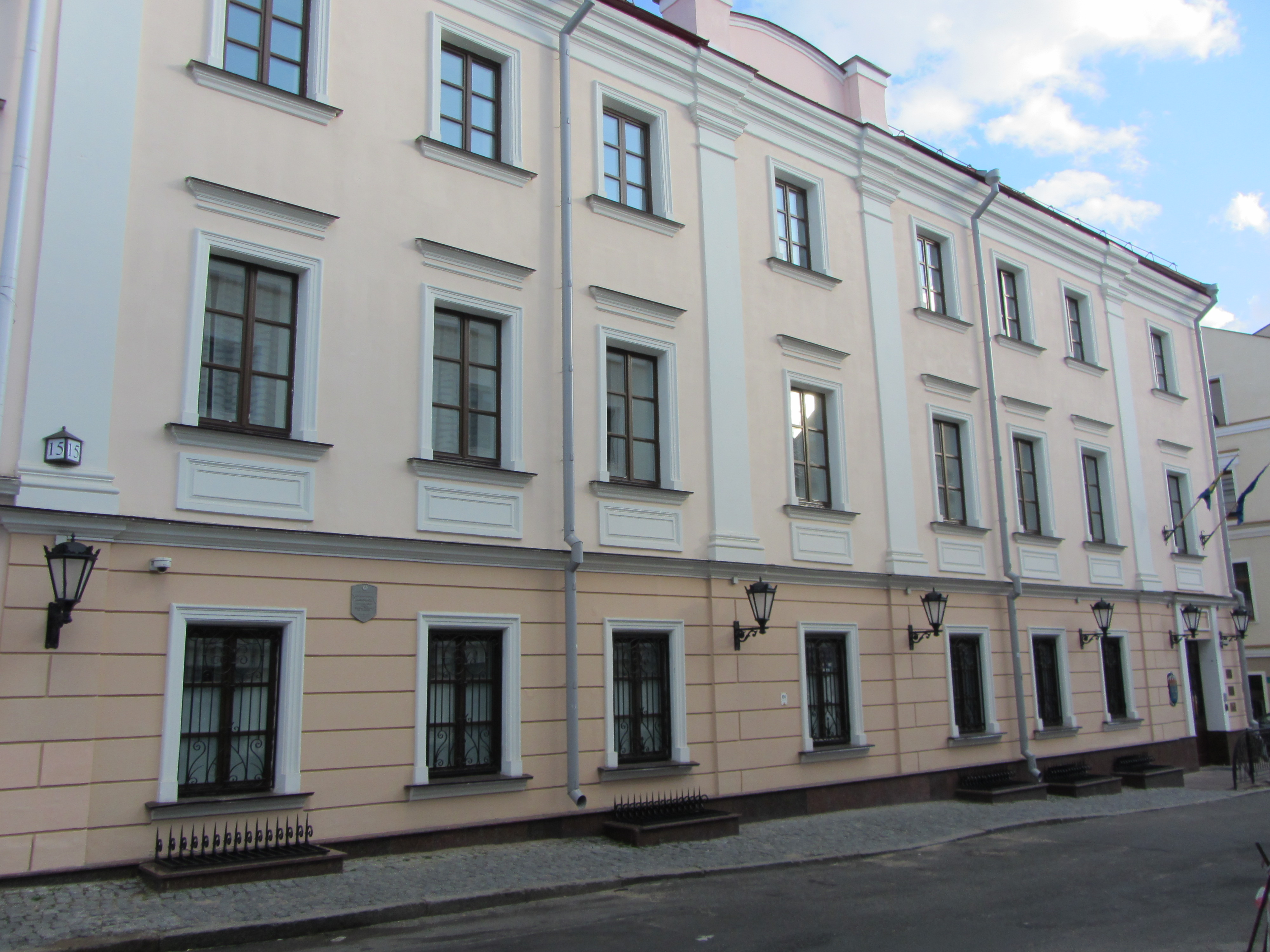 Беларуская (тарашкевіца): Вуліца Рэвалюцыйная, 15